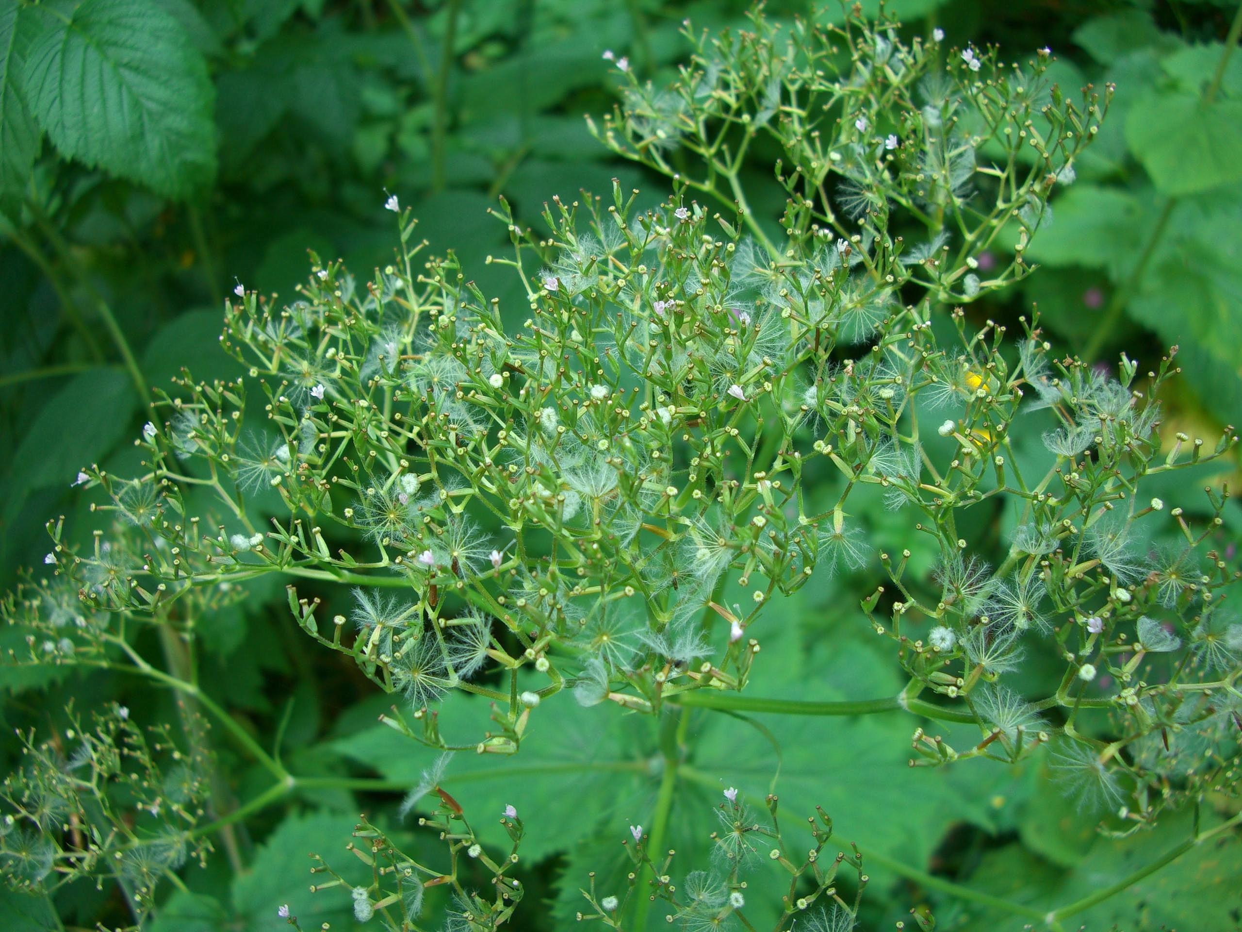 Pyrenäen-Baldrian (Valeriana pyrenaica)